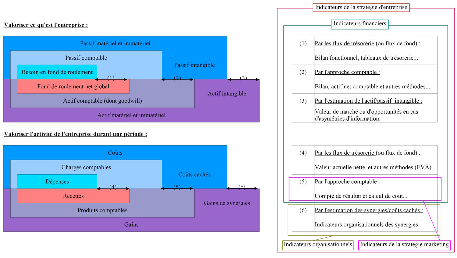 Indicateur d'évaluation de l'entreprise